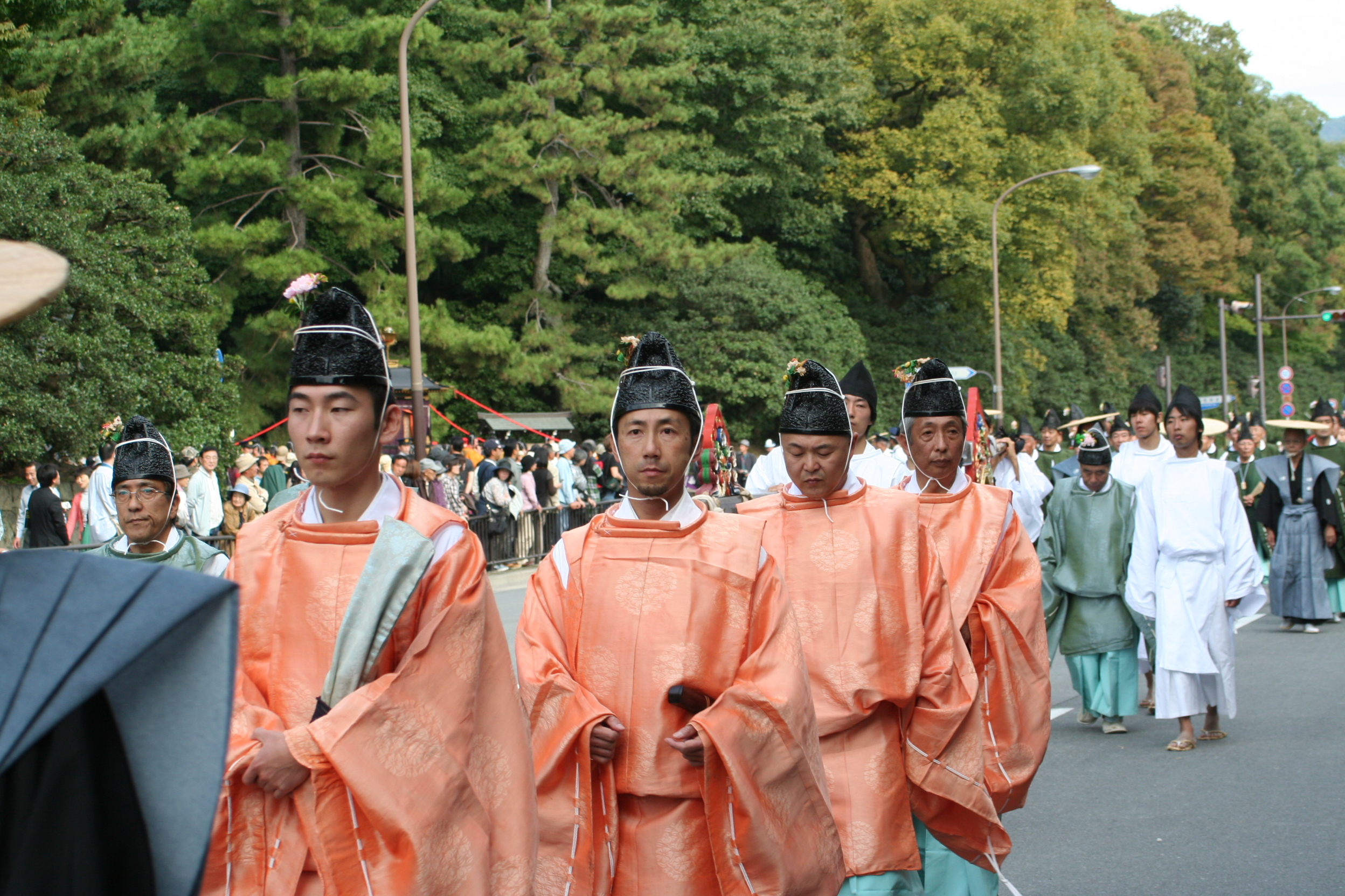 京都府京都市にて開催された時代祭。正午の御所から平安神宮までの行進の様子。2009年10月22日撮影。